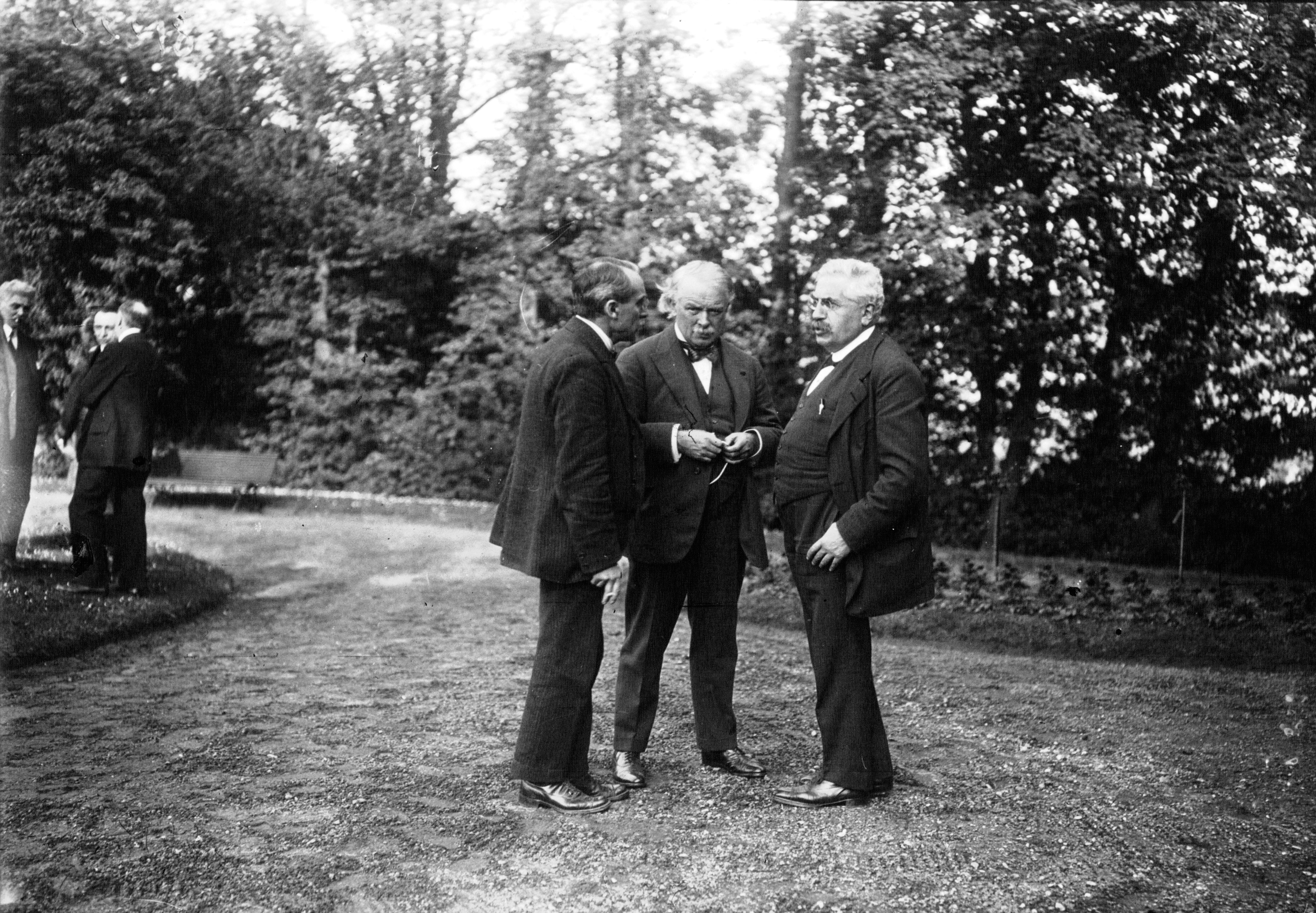 David Lloyd George (au centre) et Alexandre Millerand (à gauche) lors de la conférence interalliée de Boulogne-sur-Mer.